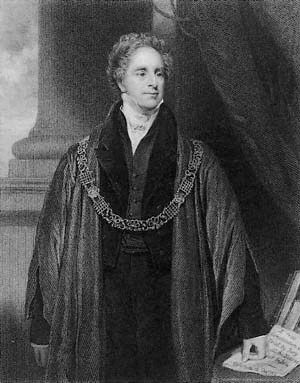 Sir Alexander Johnston (1775–1849)